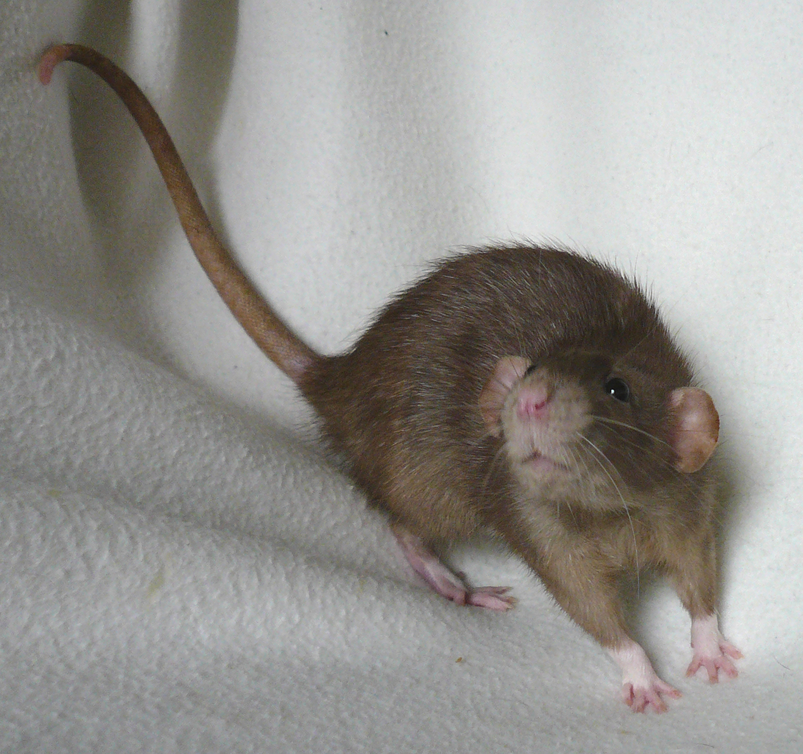 Dumboratte in der Farbe Mink